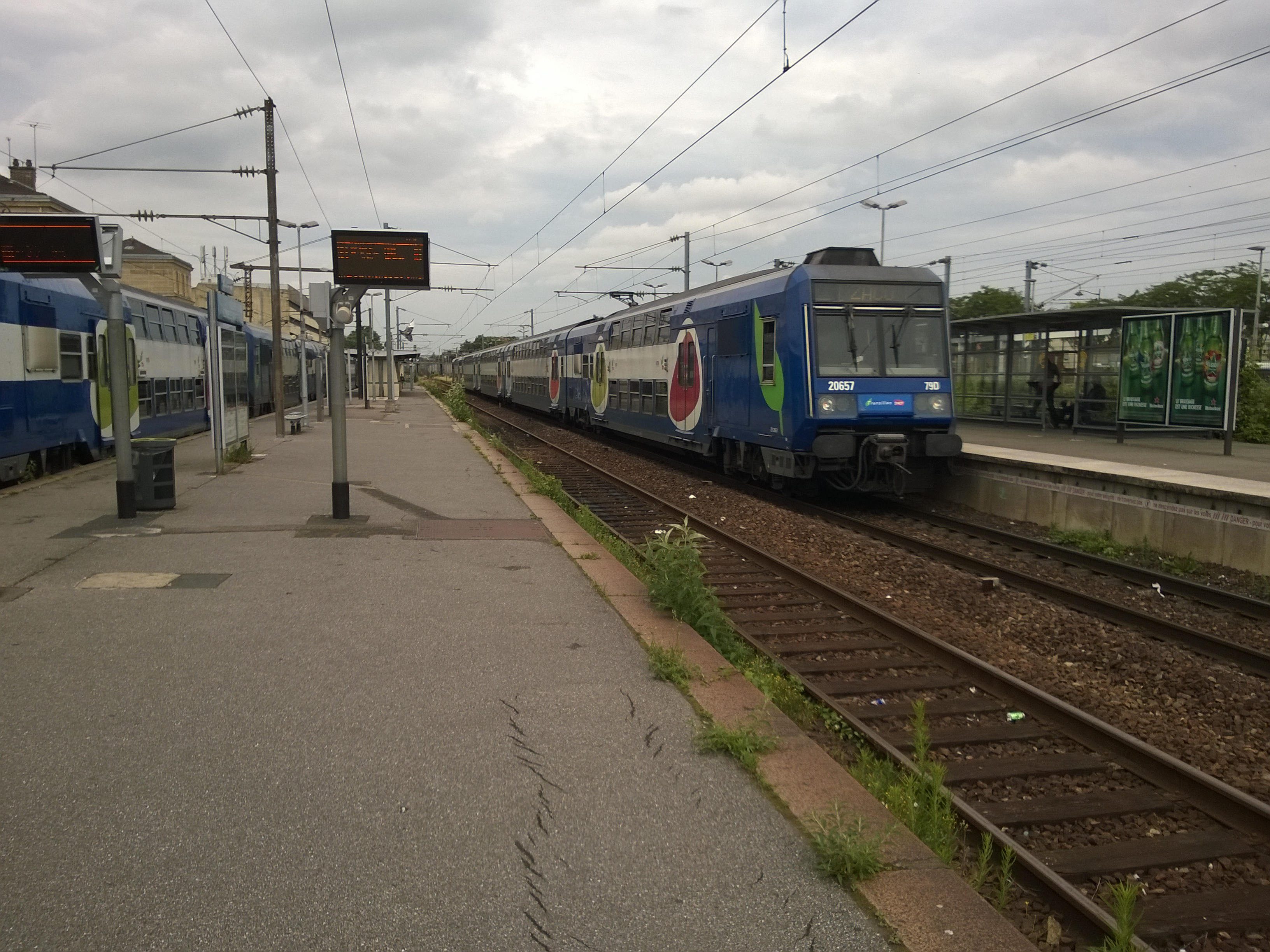 Gare de Villiers-le-Bel (Arnouville, Val d'Oise).Unité simple de Z 20500 pour Melun. Composition inhabituelle en semaine tout de même !